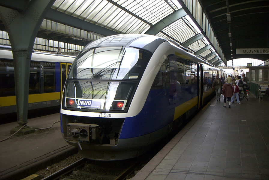 NWB Desiro VT560 nach Wilhelmshaven in Oldenburg (Oldenburg) Hbf.